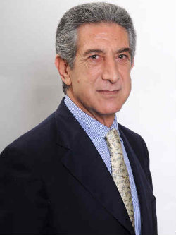 Diputado de Chile, Jorge Tarud.